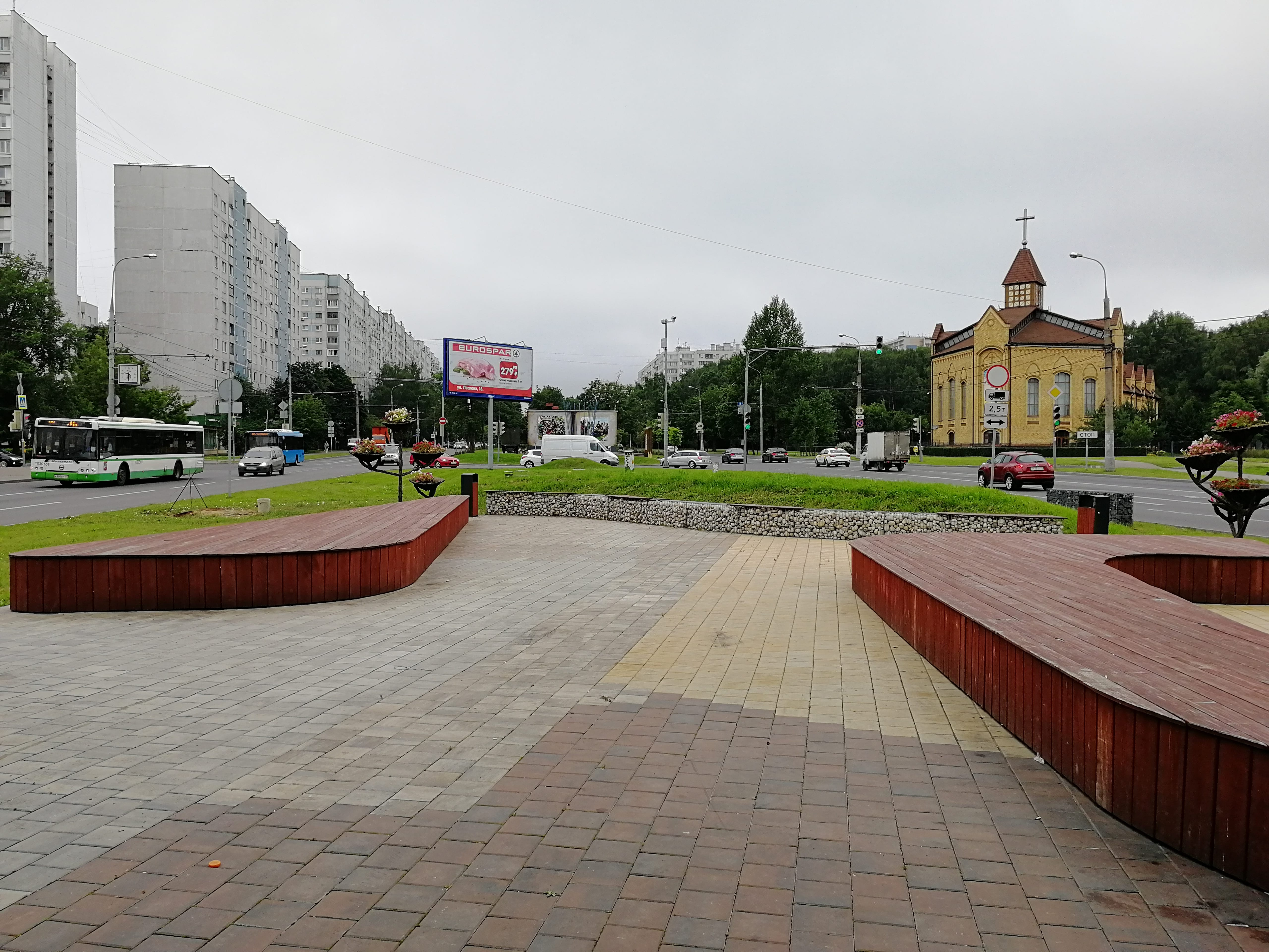 Вид на улицу Лескова и общественное пространство в сквере